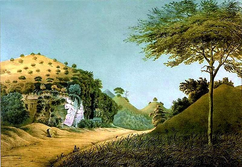 Gunung Sewu